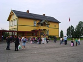 Hedemarken friskole